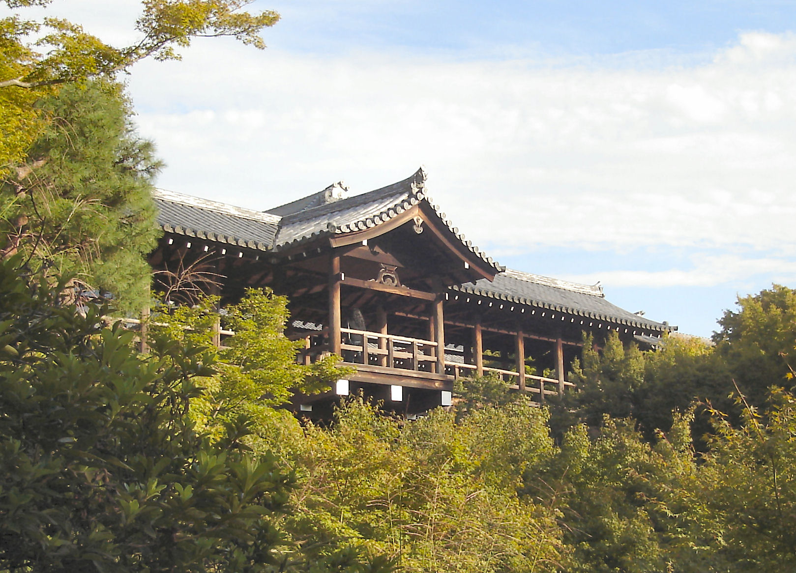 Tofukuji Tsutenkyo (東福寺 通天橋)